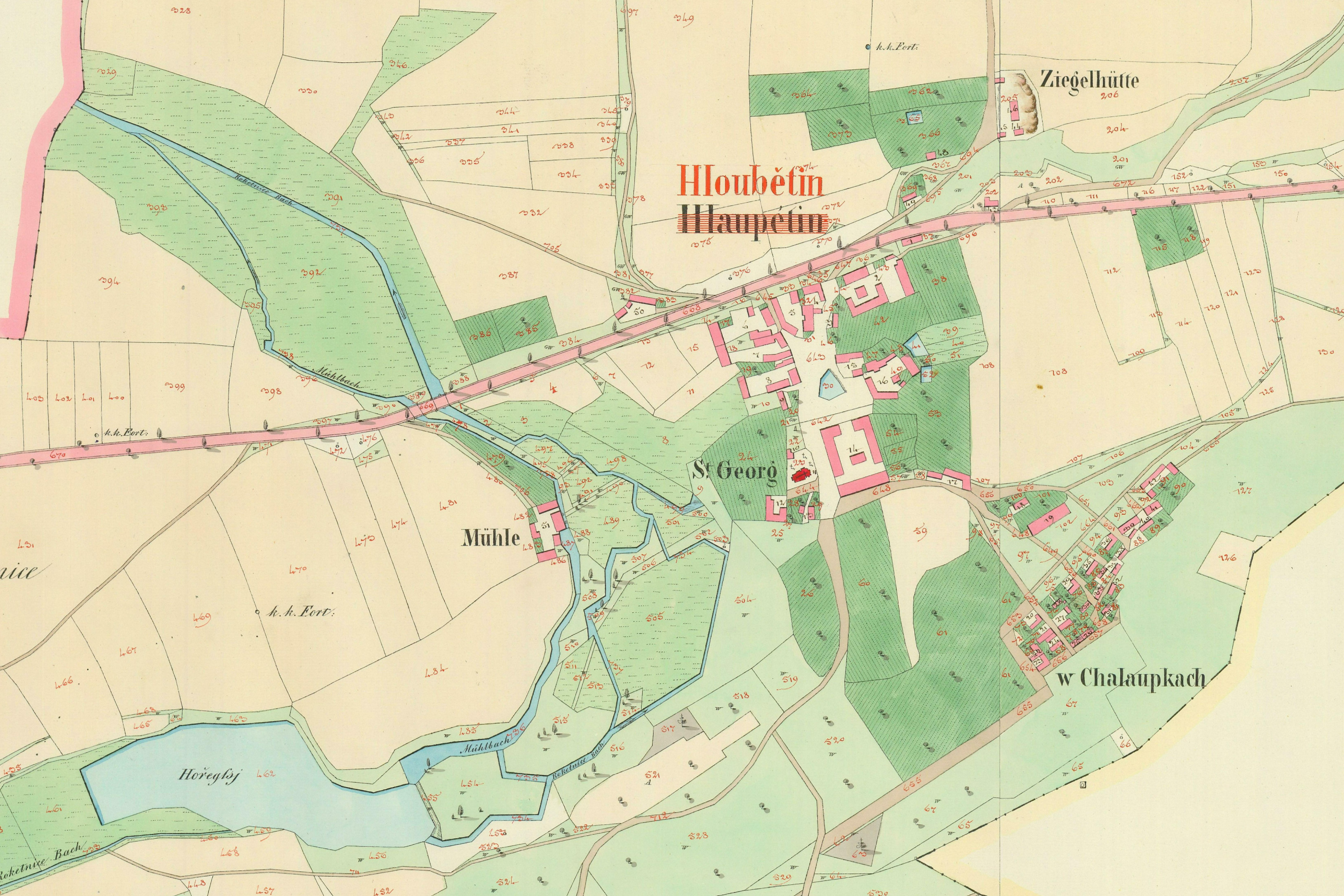 Hloubětín (Hlaupětin) na císařském otisku mapy Stabilního katastru z roku 1841 (Výřez z mapových listů kód 1930-1-003 a 1930-1-005)